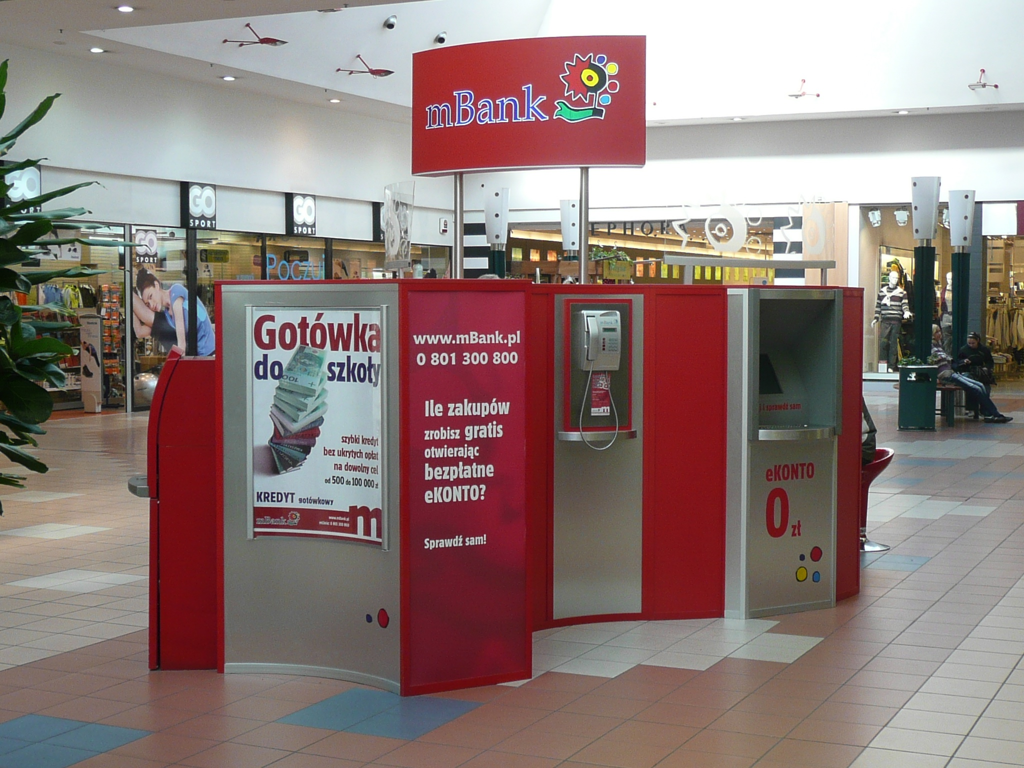 mKiosk mBanku w centrum handlowym Rondo w Bydgoszczy